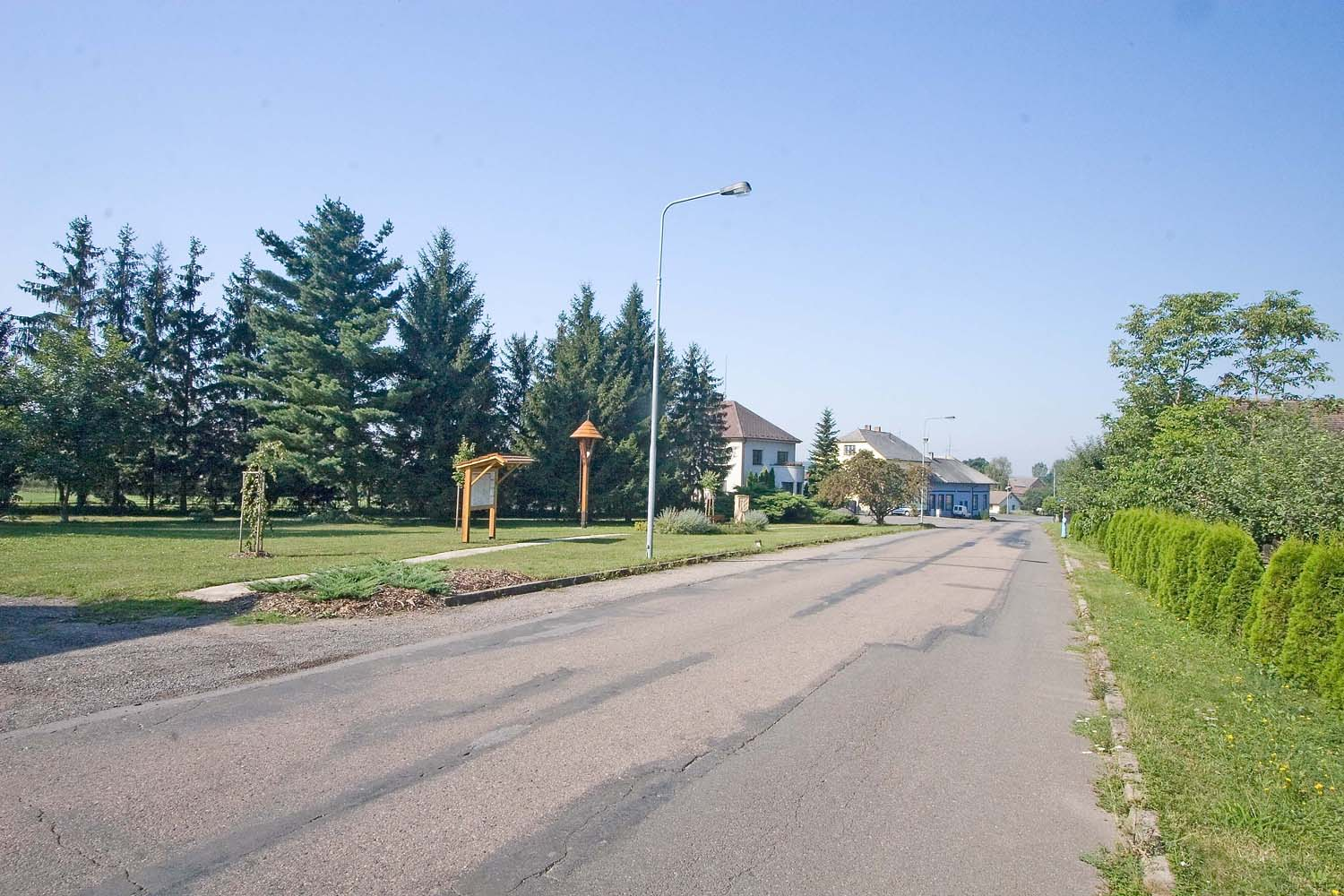 Radíkovice v okrese Hradec Králové